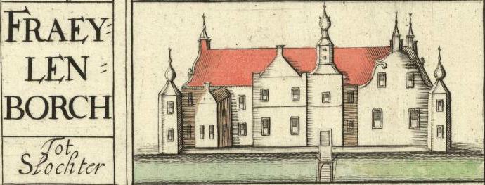 Fraeylemaborg